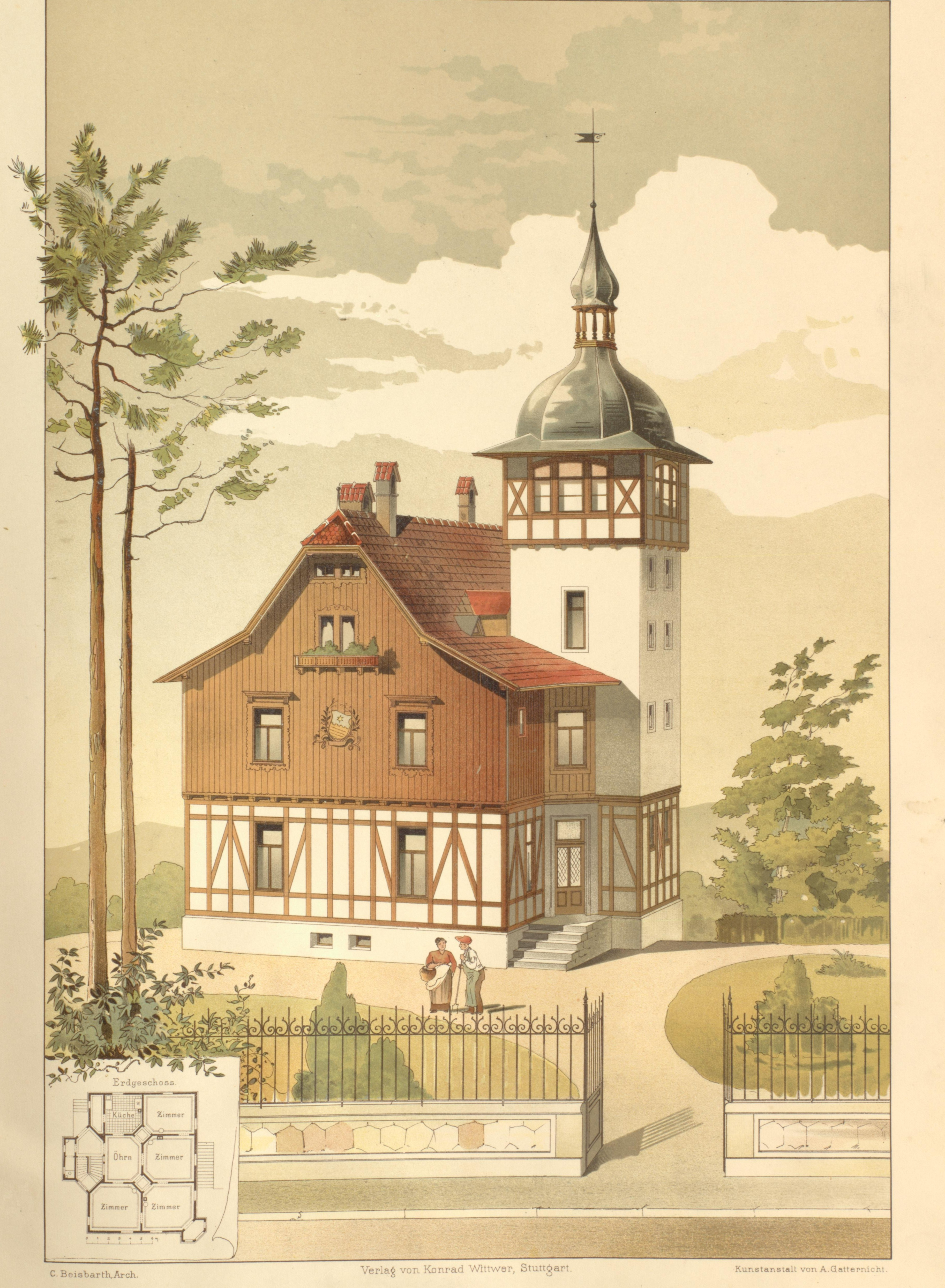 Wohn- und Landhaus Kassier Baur von Carl Friedrich Beisbarth jun., Stuttgart-Degerloch, Melittatraße 5.